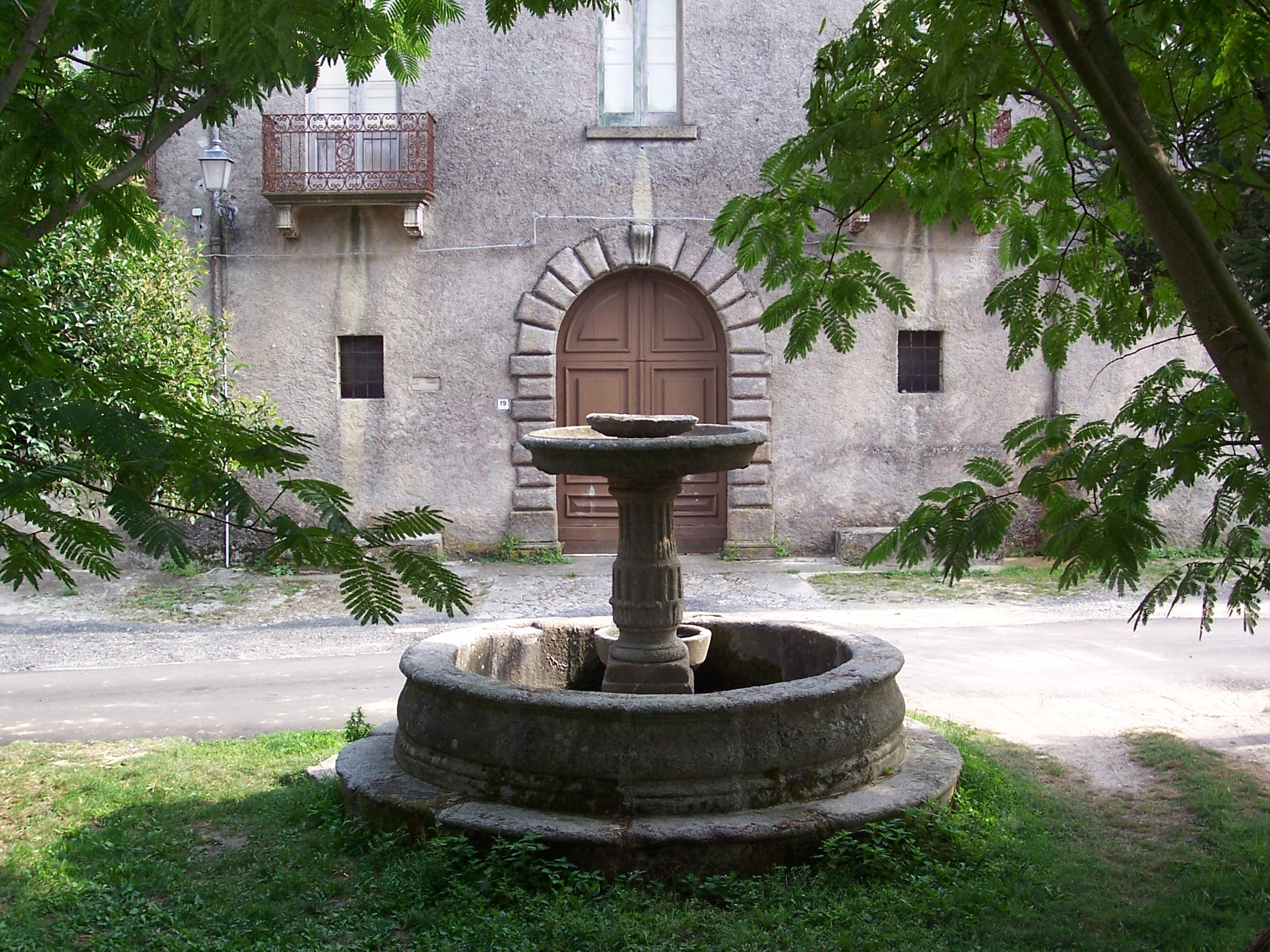 Vallelonga - Palazzo del marchese e palombaro